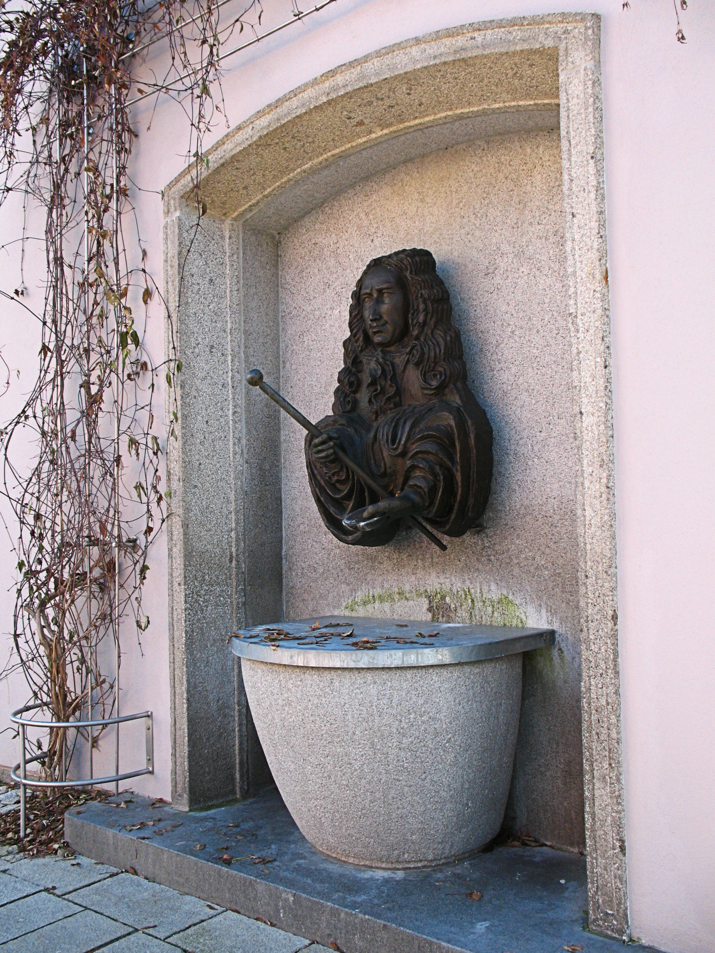 Deutschland, Oberviechtach, Dr. Eisenbarth Brunnen mit Winterabdeckung